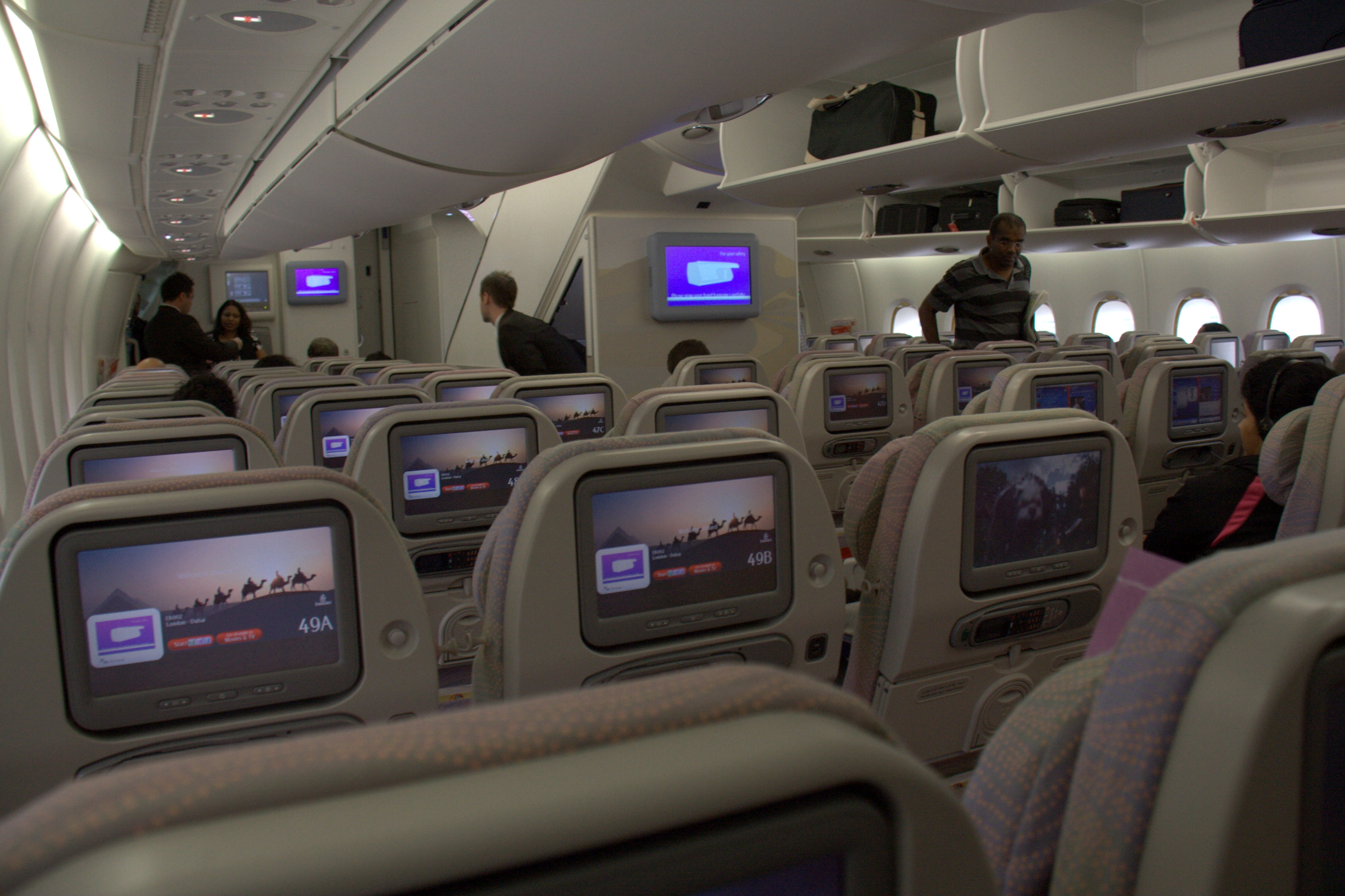 എമിറേറ്റ്സ് എയർ ബസ് എ 380 ഉൾ‌വശം